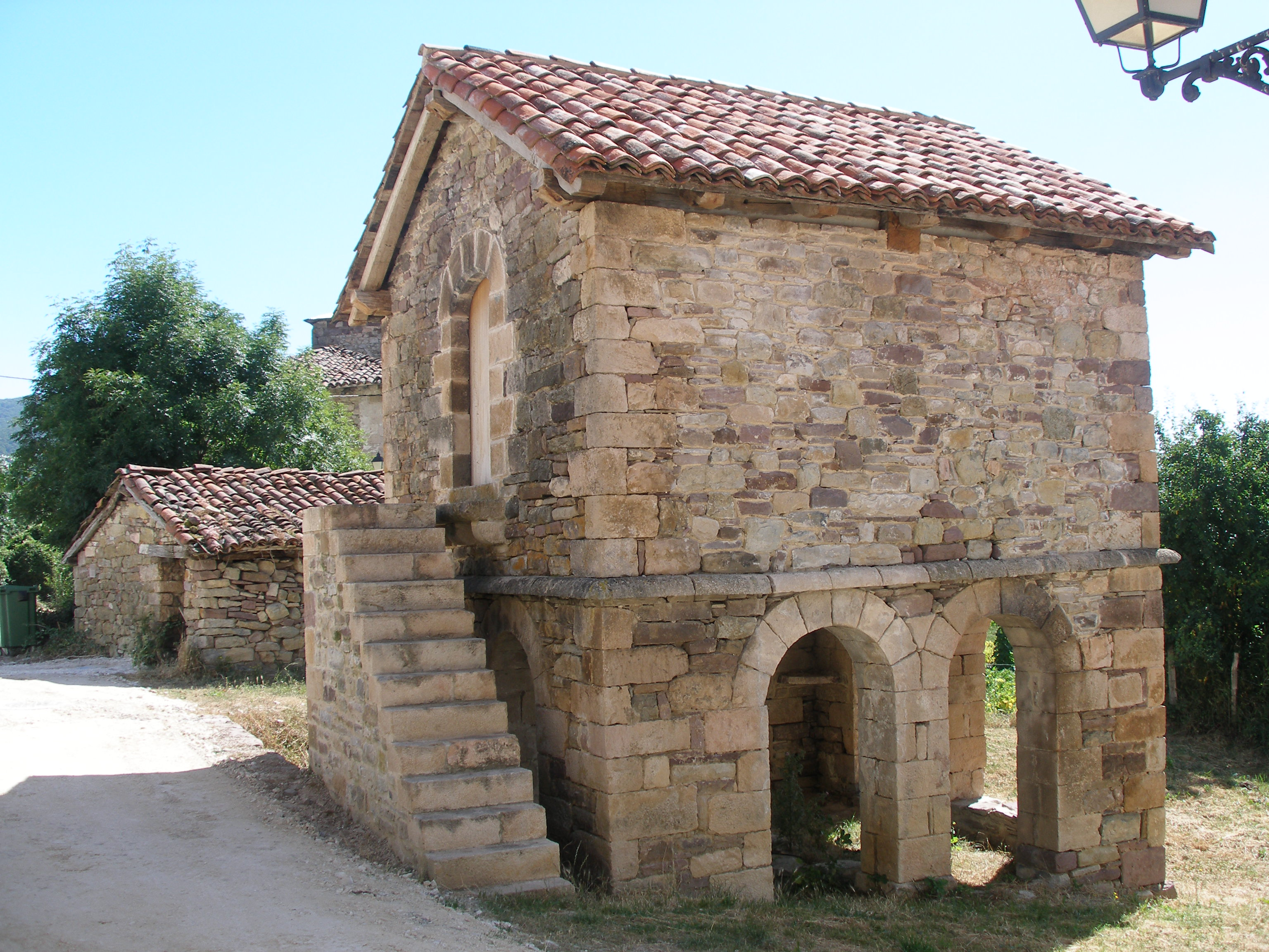 Lusarreta